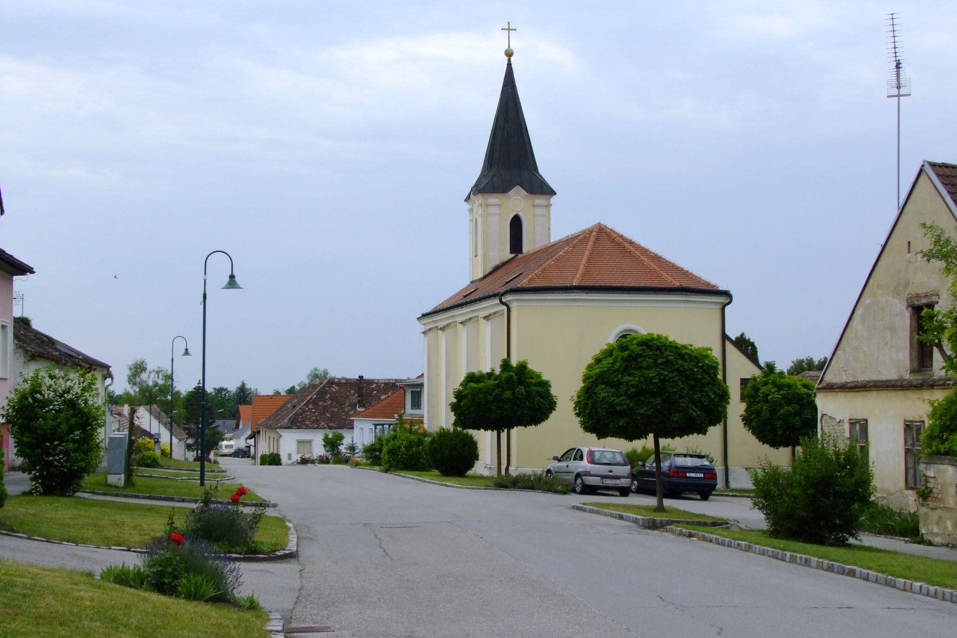 Kath. Pfarrkirche hl. Antonius von Padua